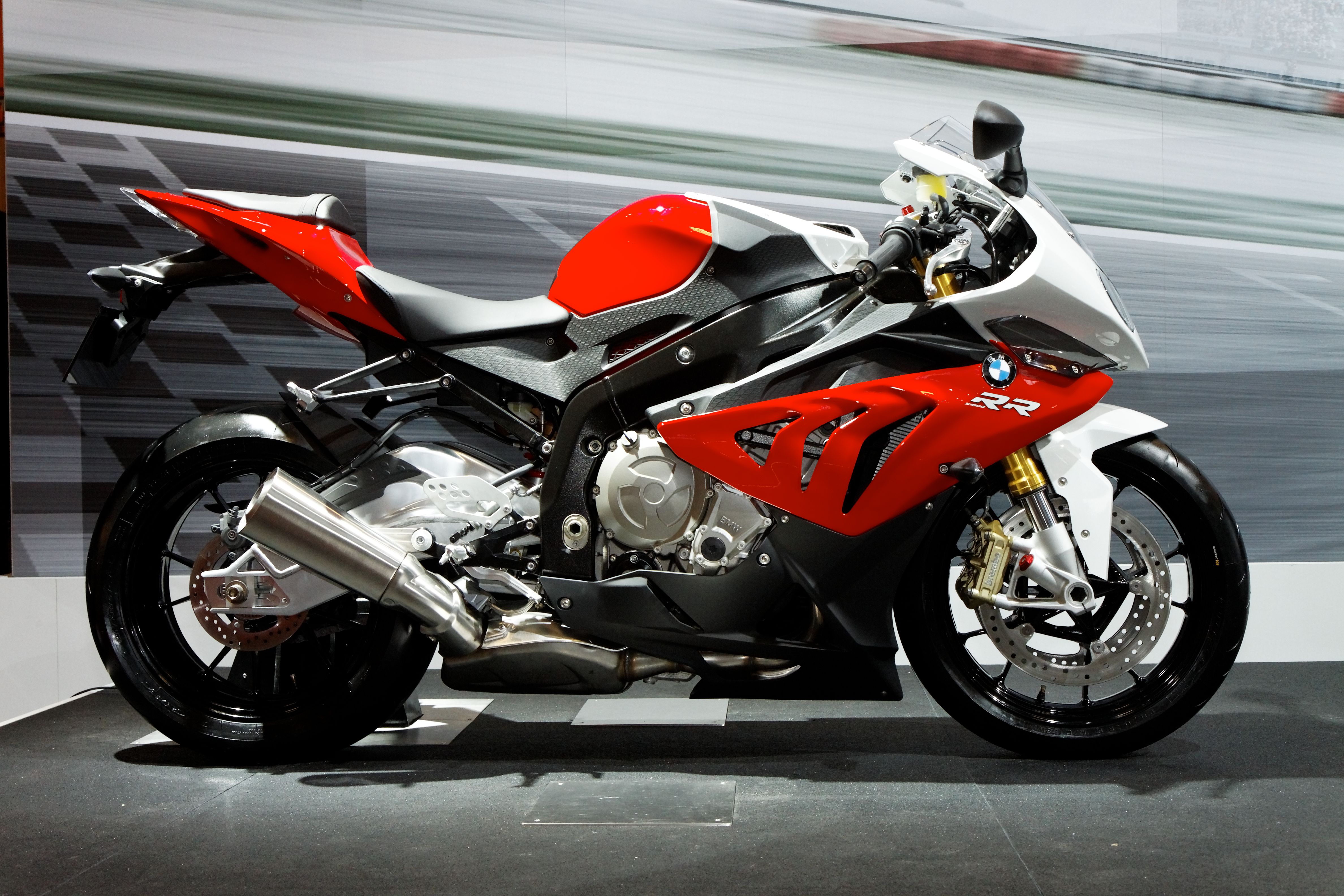 BMW - S1000 RR